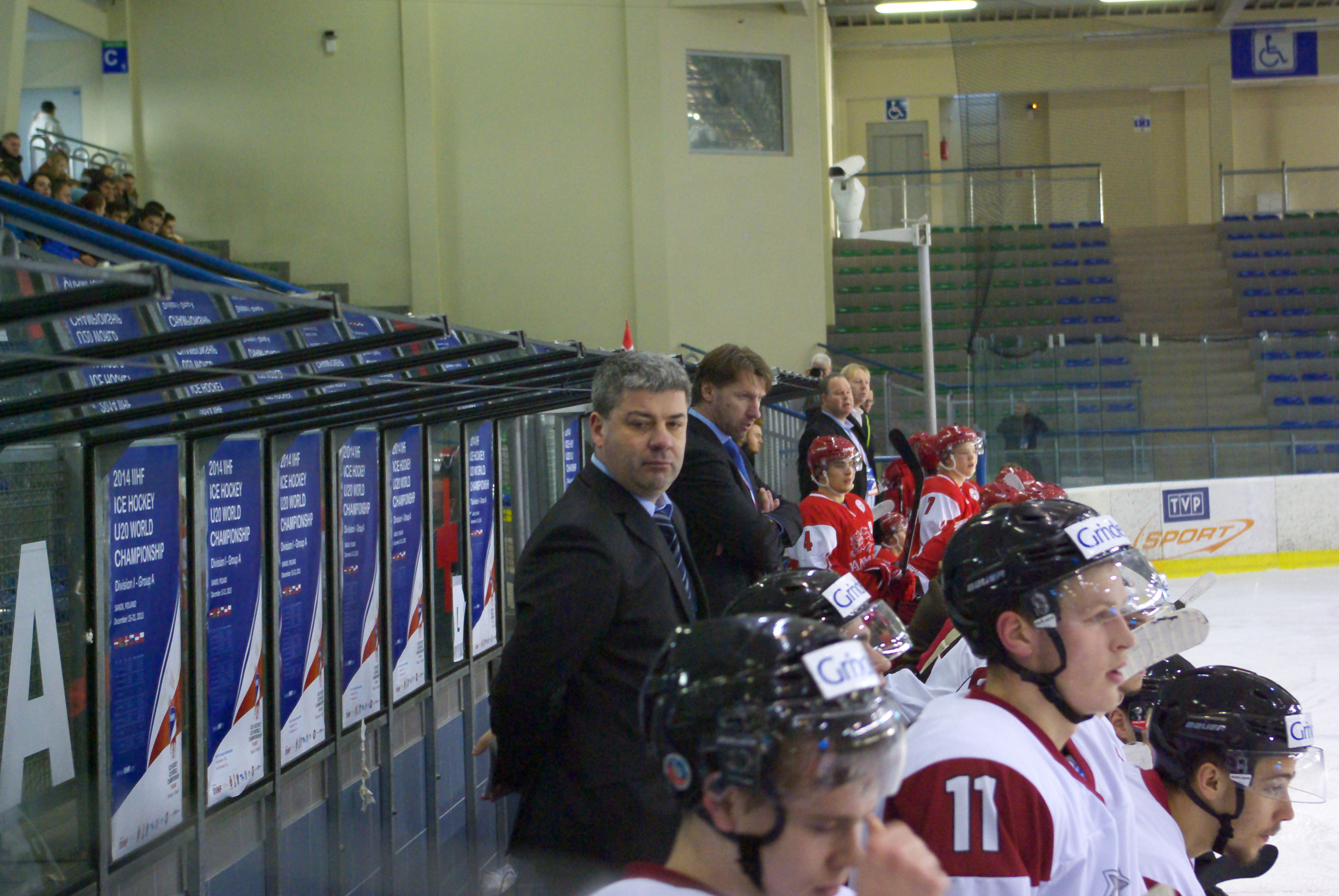 Ławka Łotwy (trener Leonīds Tambijevs) podczas Mistrzostw Świata Juniorów w Hokeju na Lodzie 2014 I Dywizji w Sanoku, Dania - Łotwa 4:1, Arena Sanok 19 grudnia 201